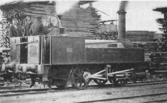 Swedish steam engine P.C. Rettig, manufactured by Nyköpings mekaniska verkstad in 1863. Image taken in Söderhamn.